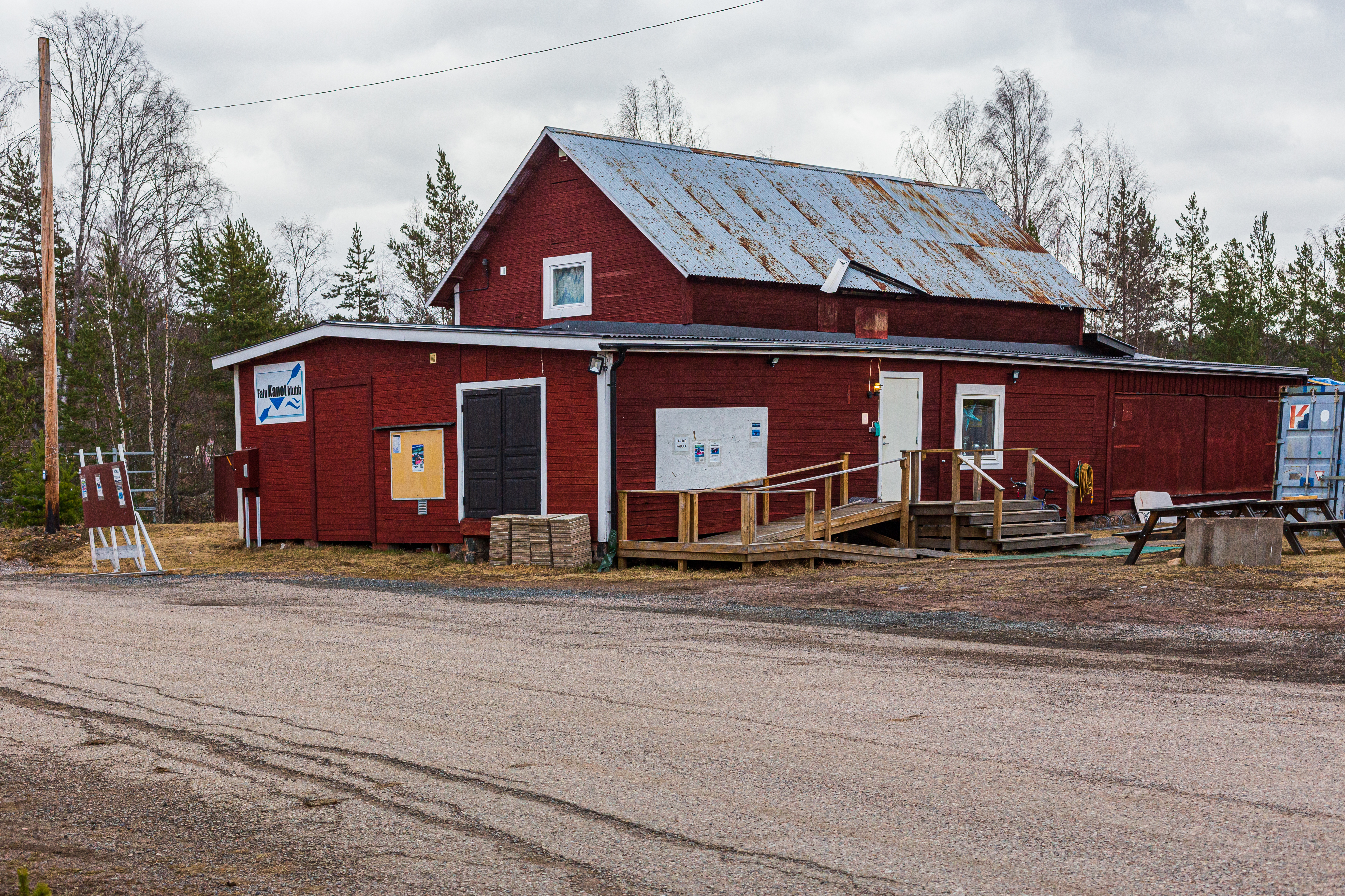 Falu Kanotklubbs klubbstuga. Hosjöholmen, Falun, Dalarnas län, Sverige.